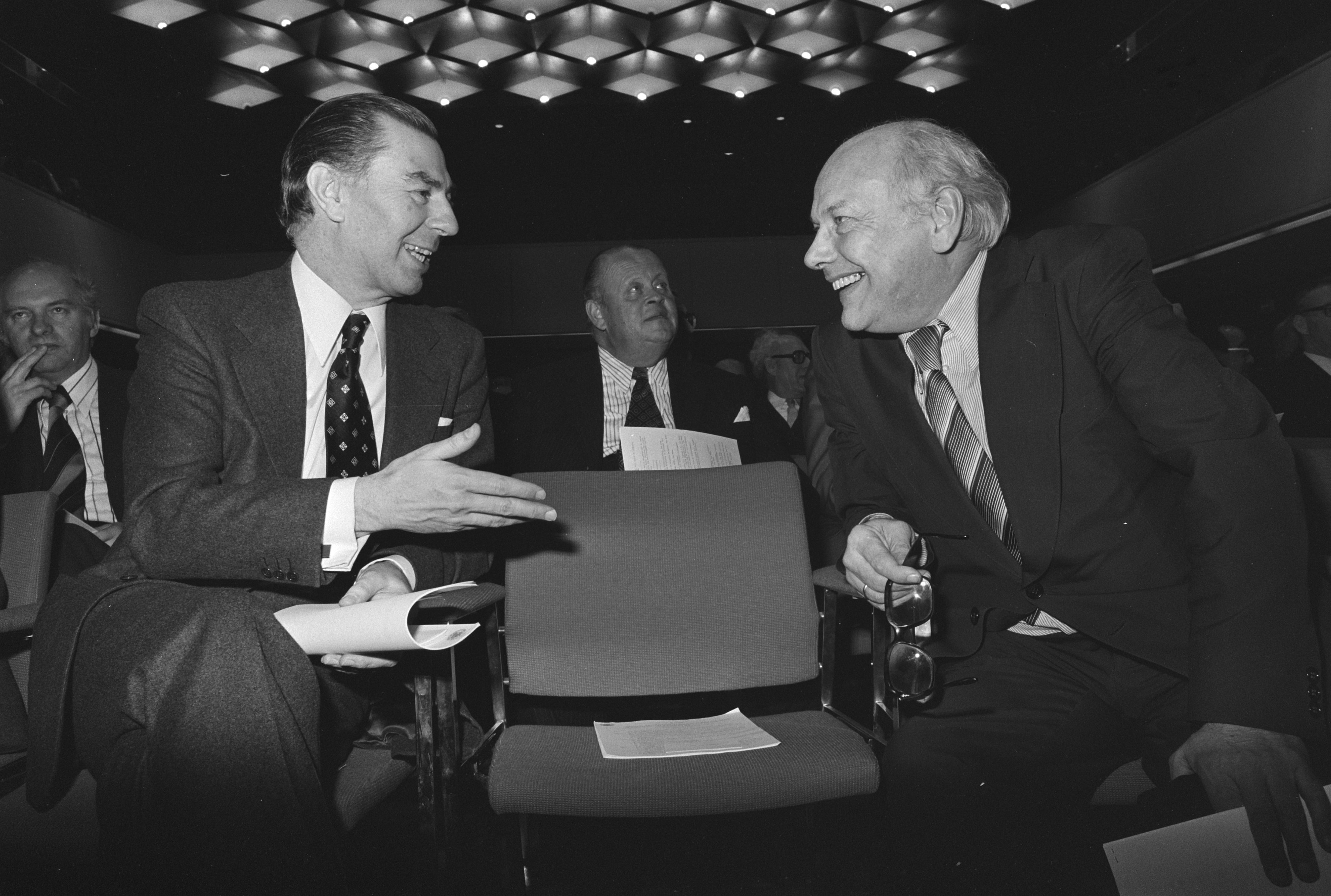 Collectie / Archief : Fotocollectie Anefo Reportage / Serie : [ onbekend ] Beschrijving : Belgische premier Tindemans op bijeenkomst Nederlandse Kamer van Koophandel voor Belgie en Luxemburg in Den Haag ; Tindemans (l.) en Den Uyl / Datum : 23 maart 1976 Locatie : België, Den Haag, Luxemburg Trefwoorden : bijeenkomsten, premiers Persoonsnaam : Tindemans, Leo, Uyl, Joop den Instellingsnaam : Kamers van Koophandel Fotograaf : Mieremet, Rob / Anefo Auteursrechthebbende : Nationaal Archief Materiaalsoort : Negatief (zwart/wit) Nummer archiefinventaris : bekijk toegang 2.24.01.05 Bestanddeelnummer : 928-4798